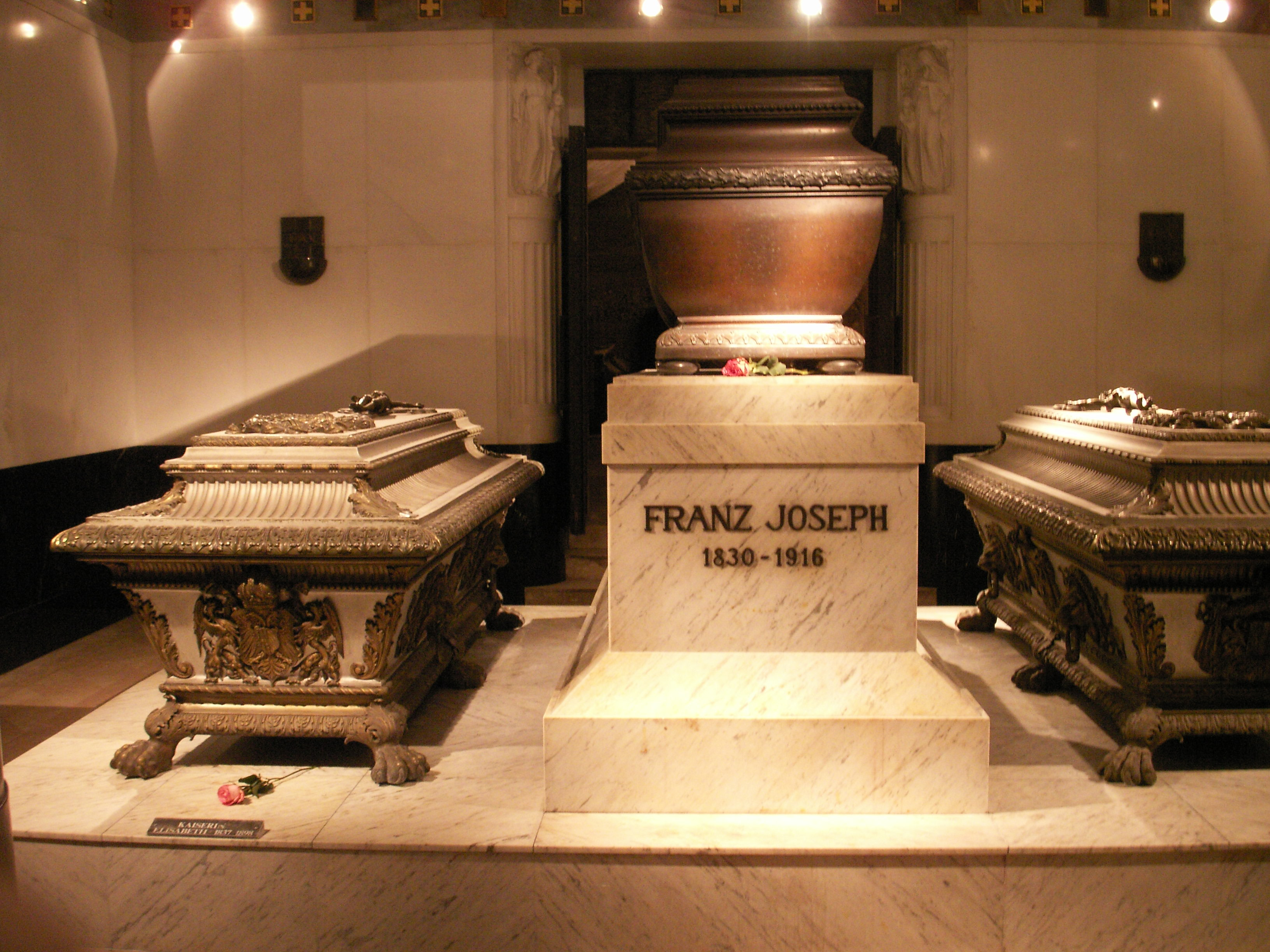 Kapuzinergruft, Wien, (v.links) Sarkophag Kaiserin Elisabeth ("Sisi"), Kaiser Franz Joseph, Kronprinz Rudolf